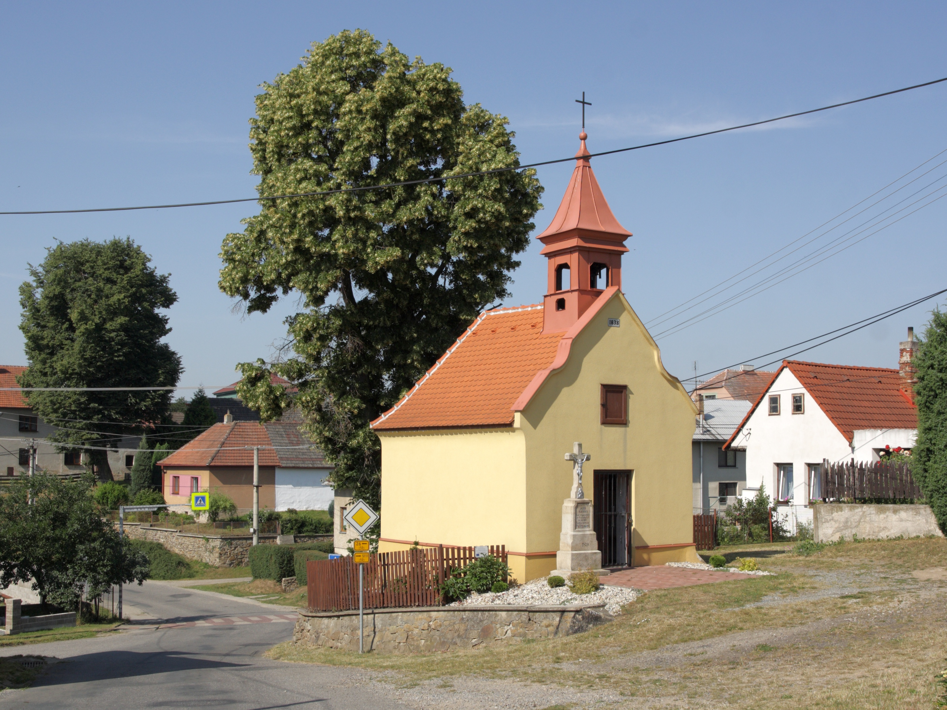 Petrovice (okres Třebíč) - kaple.